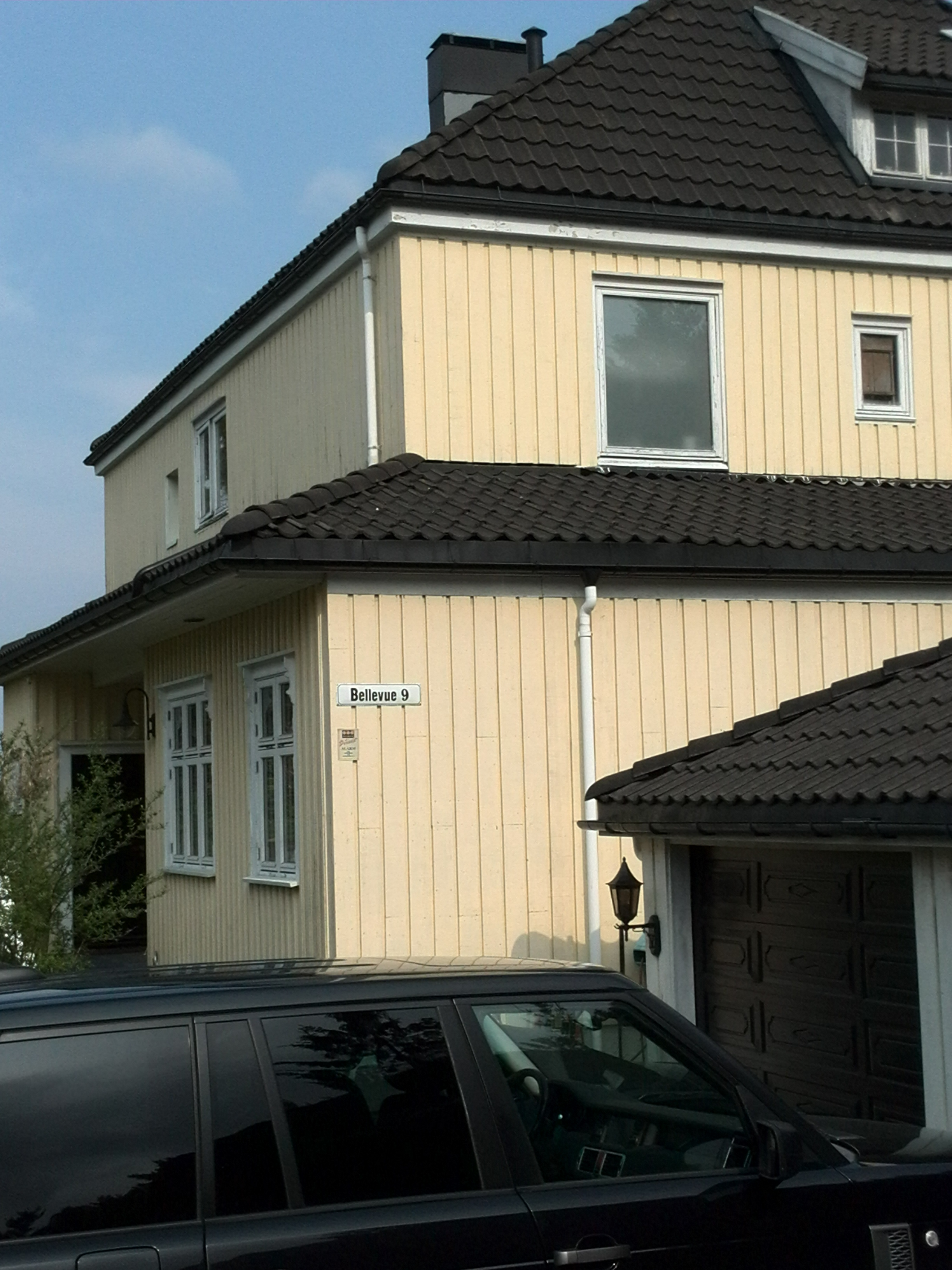 Keyser Frølichs bolig